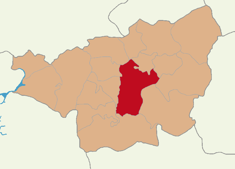 Sur ilçesinin konumu